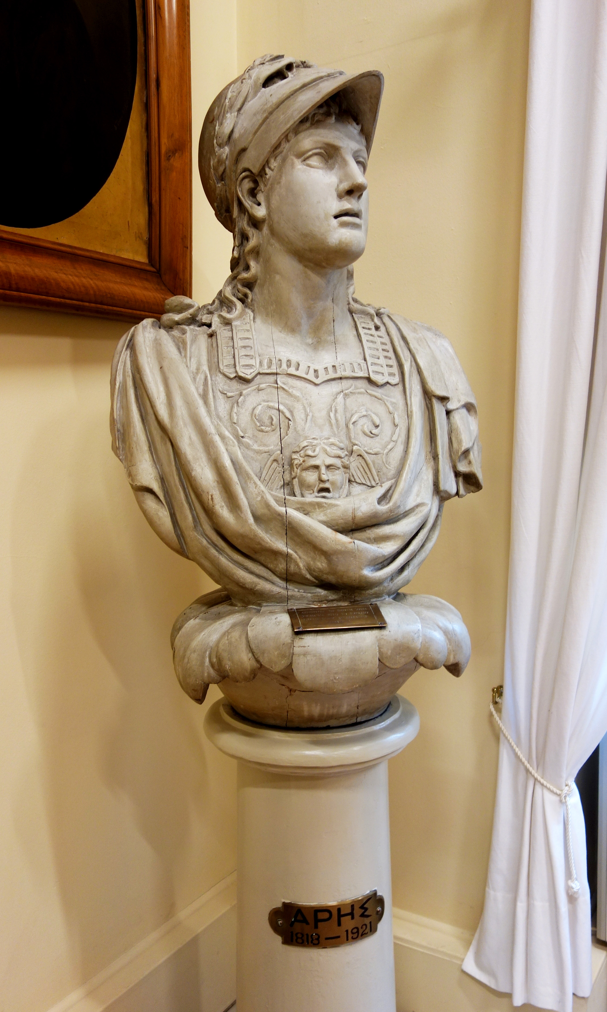 Mvskoke: Το ακρόπρωρο του θρυλικού βρικίου "Άρης" του Αναστάσιου Τσαμαδού. Εθνικό Ιστορικό Μουσείο